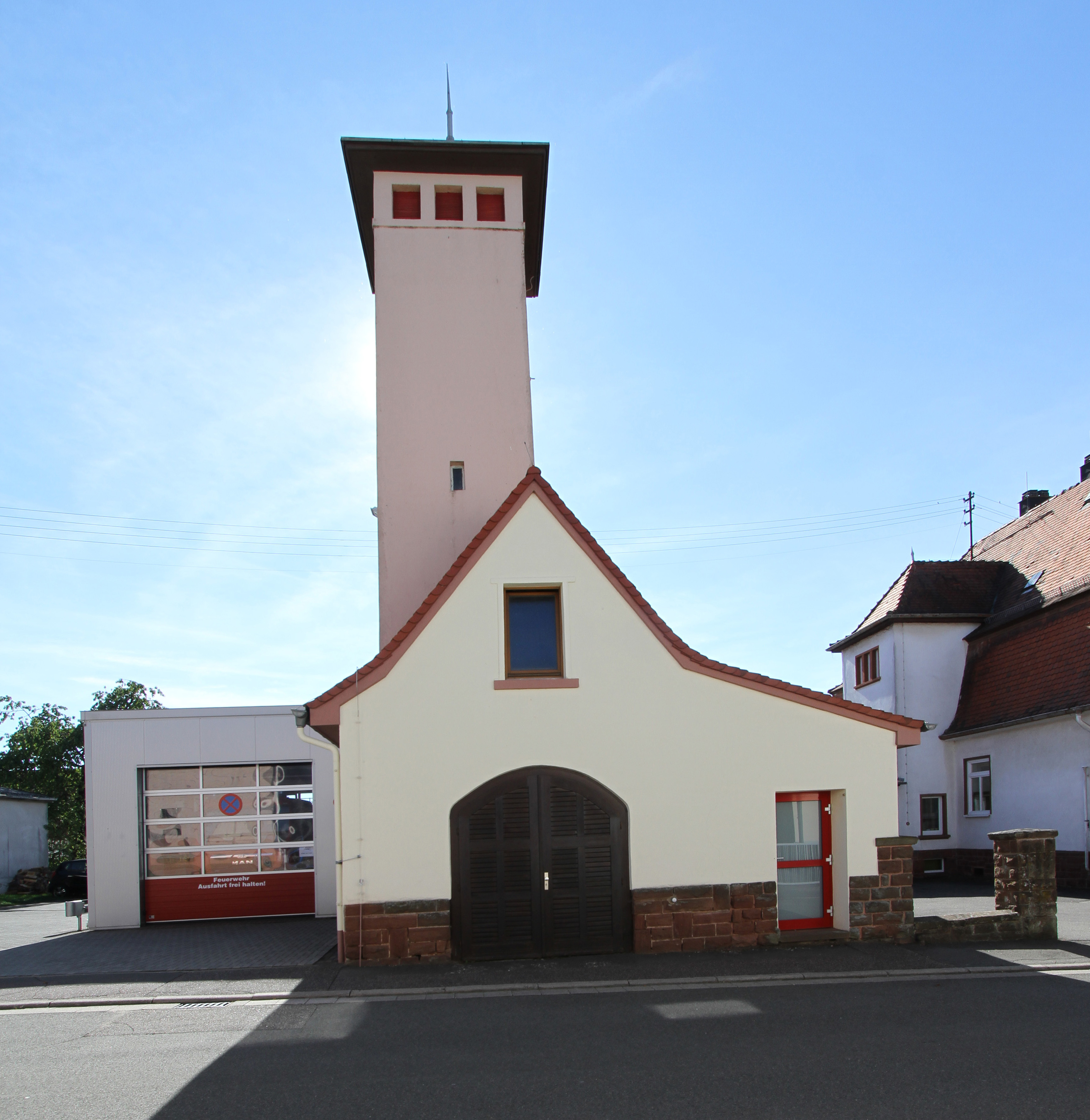 Höheischweiler, Feuerwache